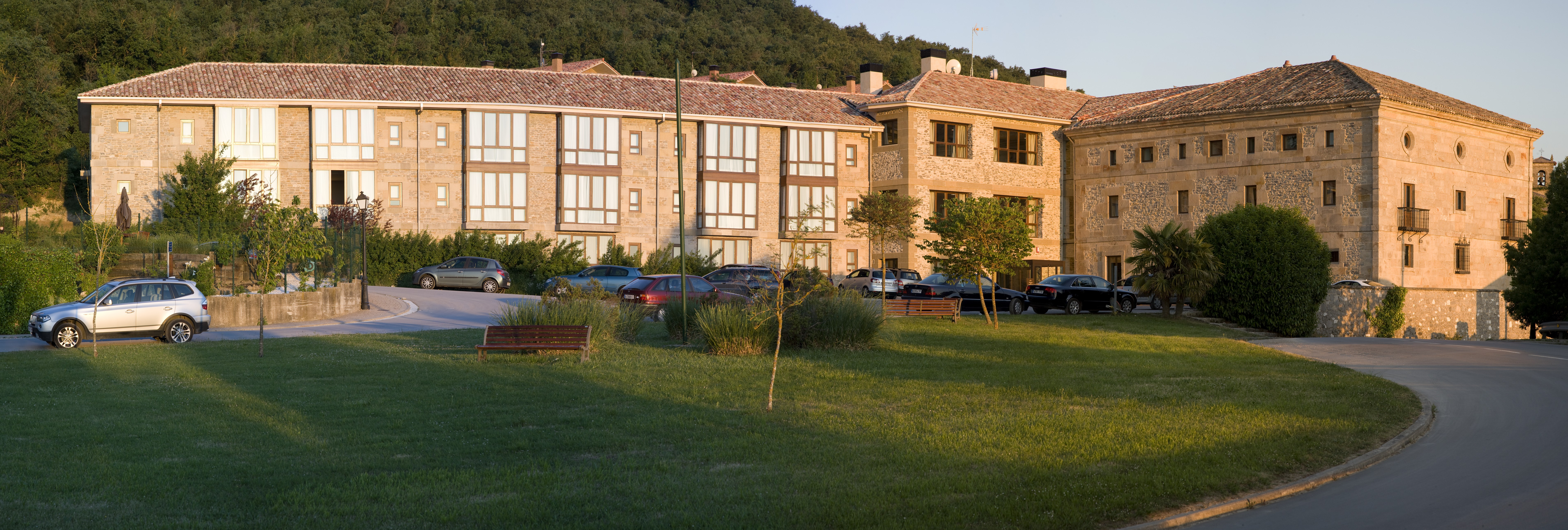 Parador de Argómaniz